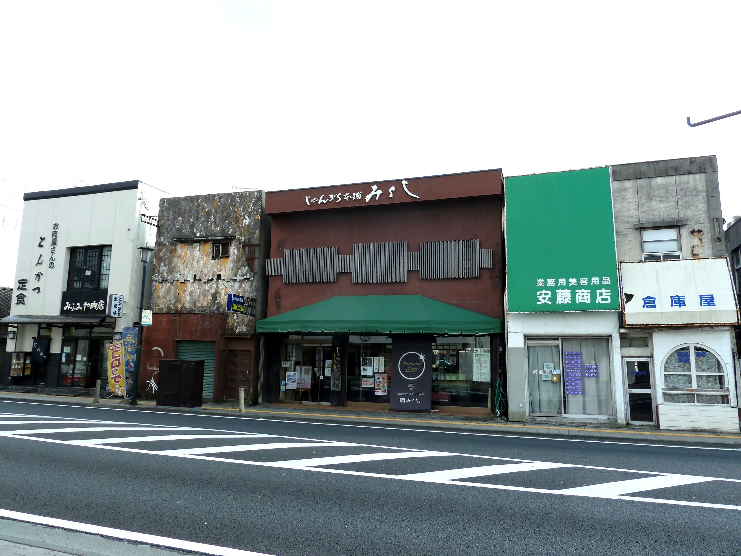 みよし旧本店